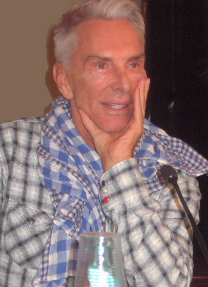 Wolfgang Joop (2009)